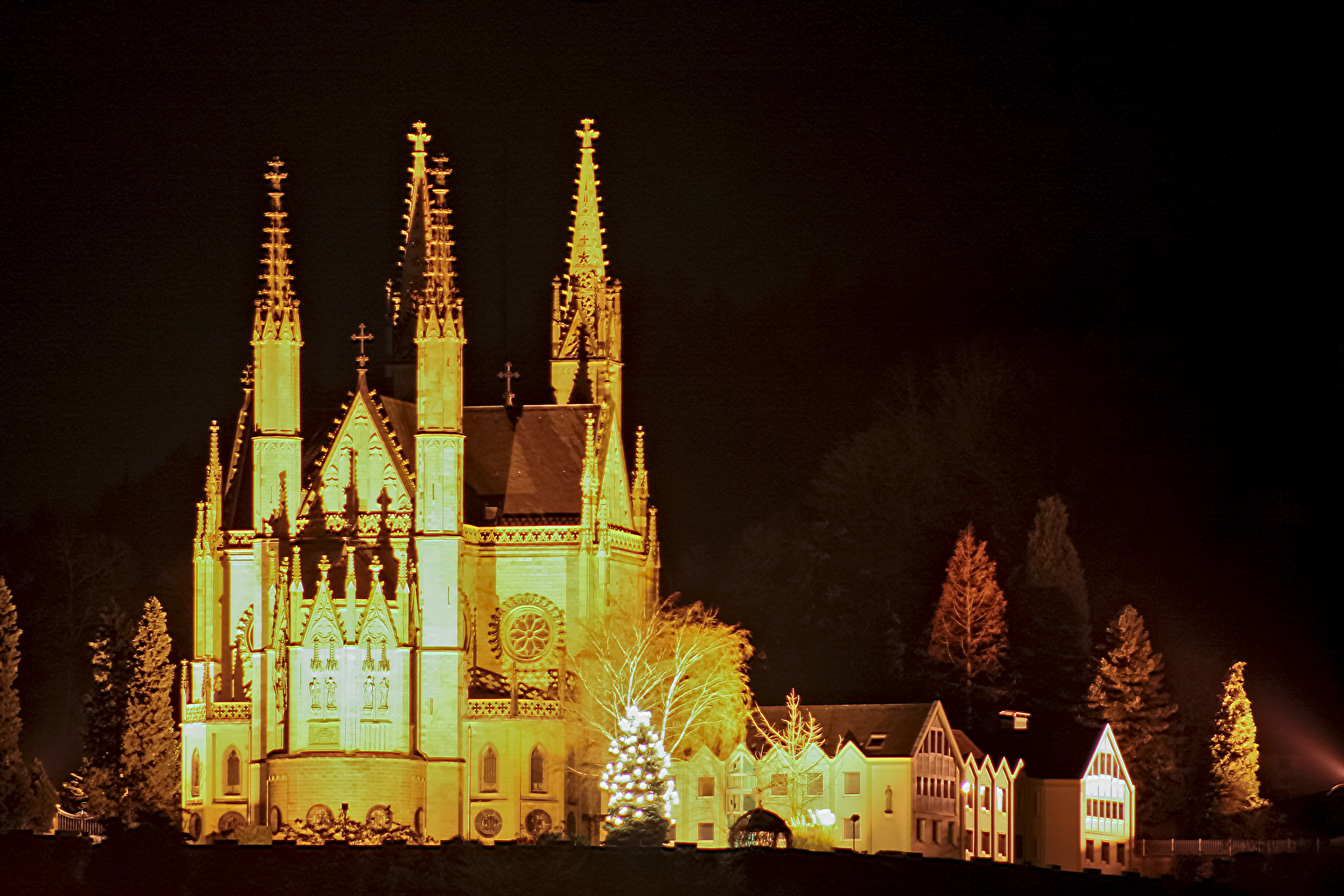 Apollinariskirche in Remagen